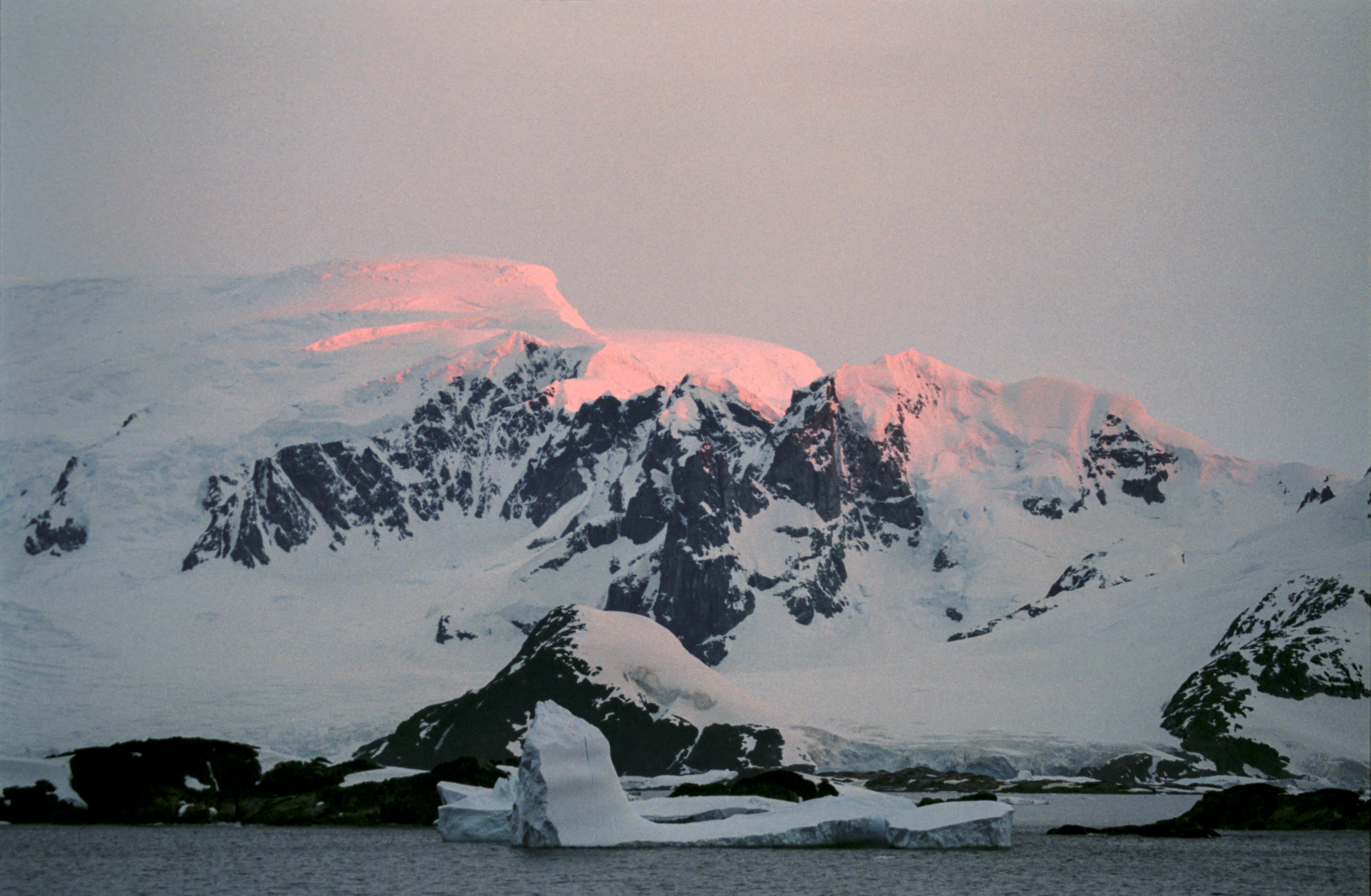 Antarctic